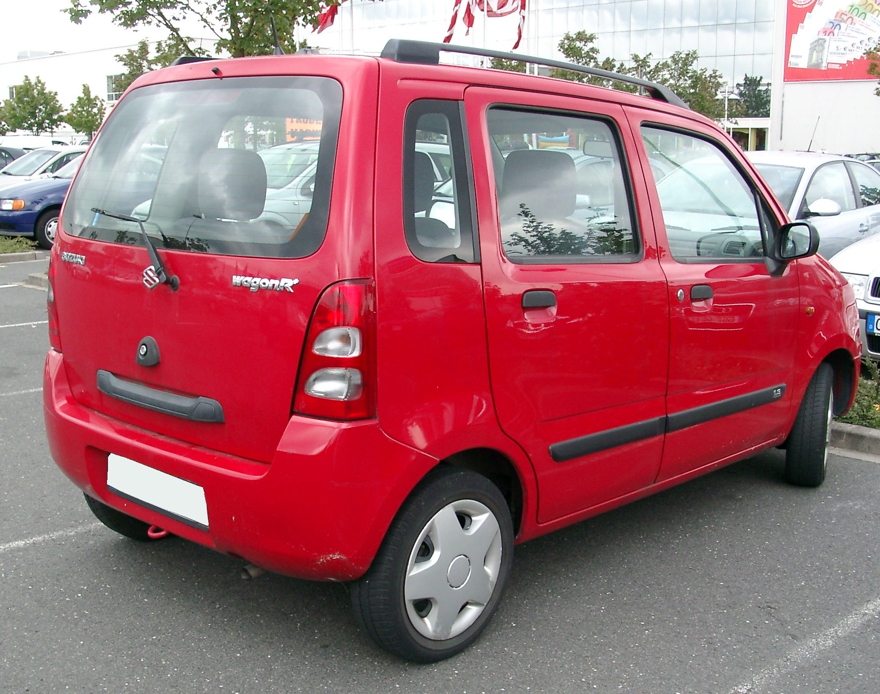 Suzuki Wagon R+